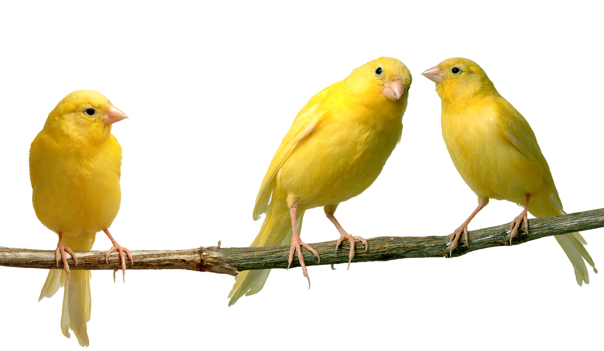 Serinus canaria domestica